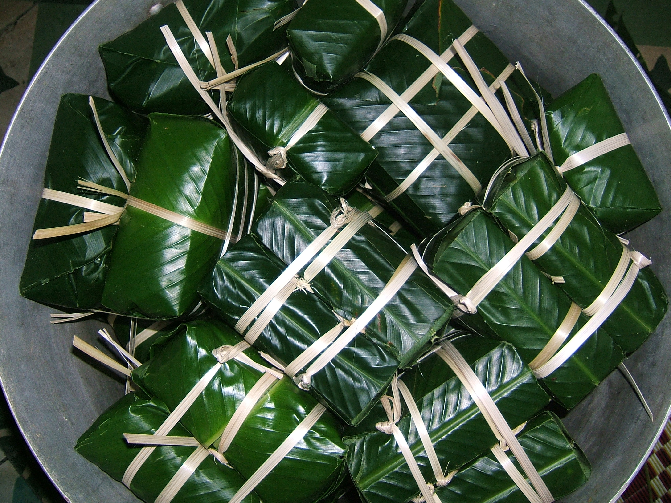 Bánh chưng buộc thành từng cặp trong nồi chuẩn bị nấu